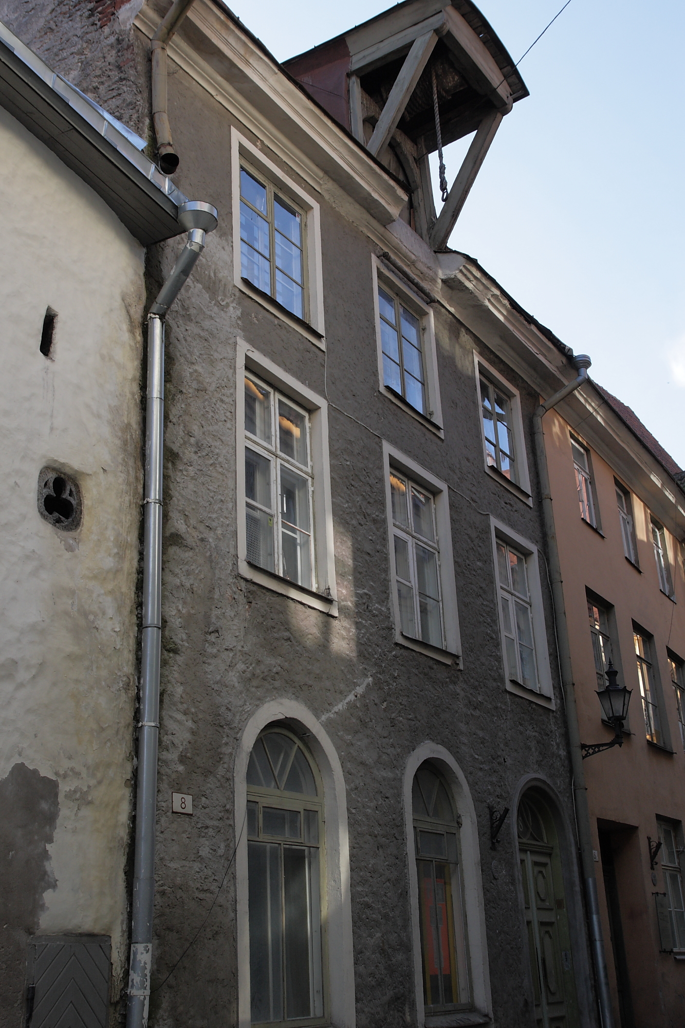 Tallinn, elamu Sauna 8, 15.-19.saj